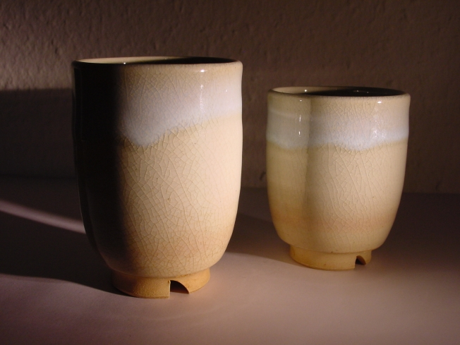 Hagiyaki-Keramik